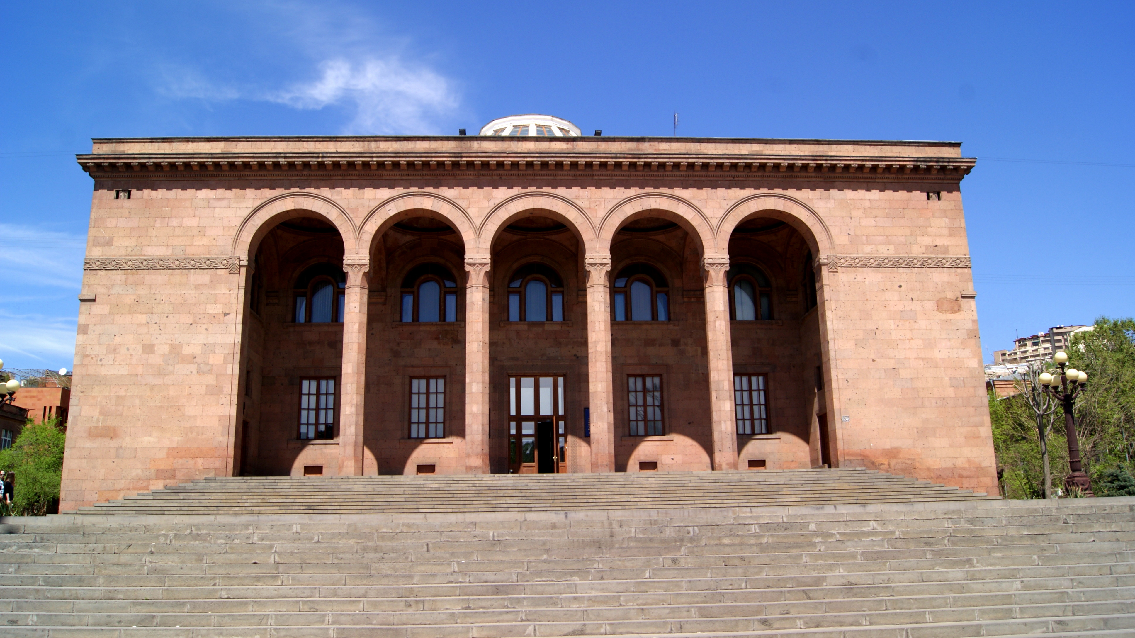 RA National Acaedmy of Sciences, main building 6/1.1